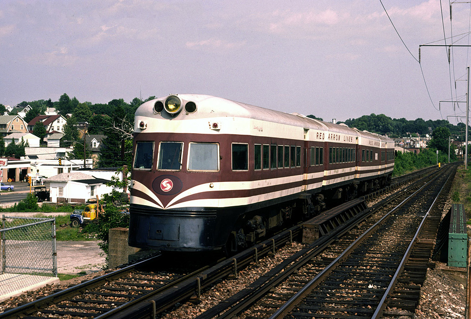 liberty liner Ardmore